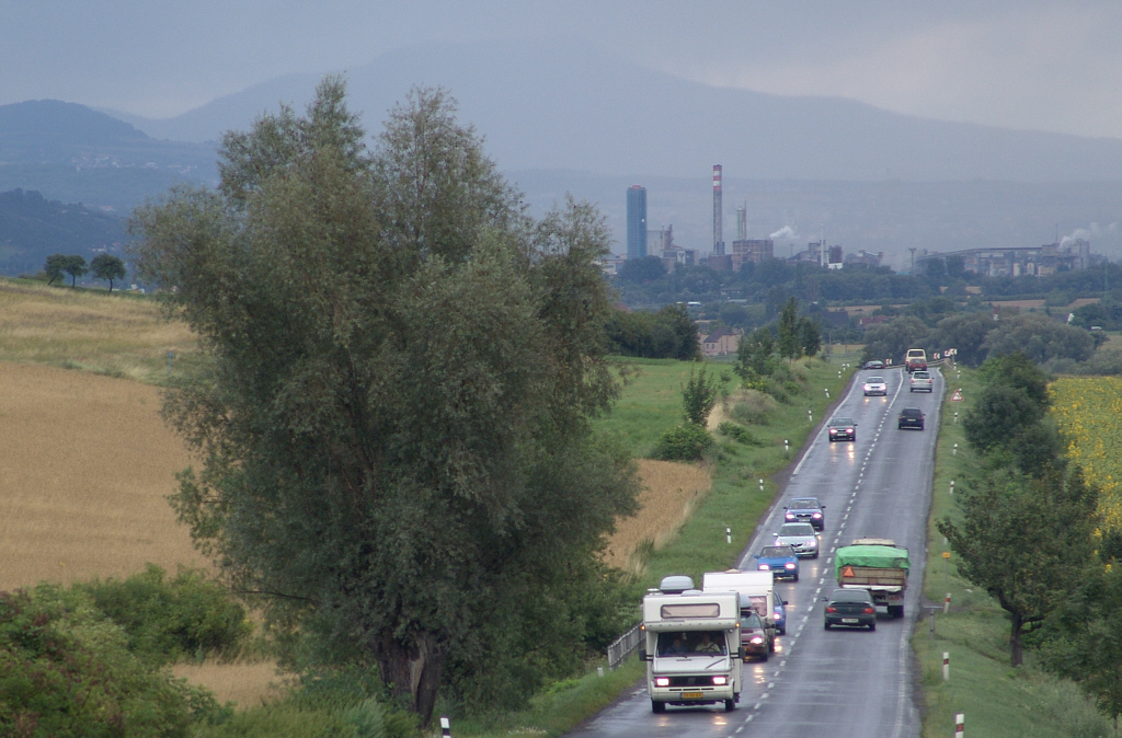 Blick auf die Industriestadt Lobositz (Lovosice)(Foto von 2005). Im Hintergrund Erhebungen des Böhmischen Mittelgebirges.